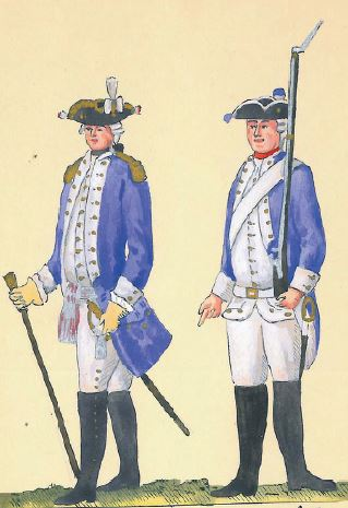 67. 1 Regiment Pieszy Buławy Wielkiej Litewskiej (oficer i szeregowy 1 regimentu pieszego BWL